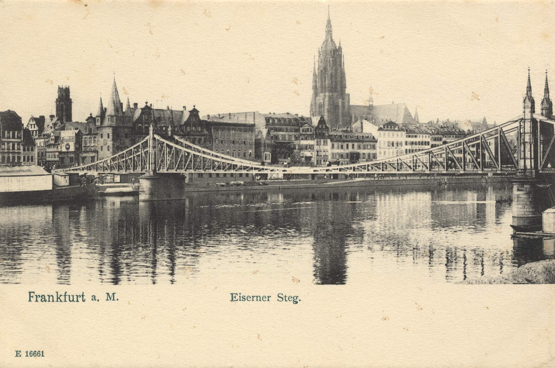 Eiserner Steg auf einer Postkarte zwischen 1903–05 (aufgrund der abgebrochenen Turmspitze der Alten Nikolaikirche). Im Hintergrund die Altstadt mit Rententurm & Saalhof am Untermainkai. Dahinter der Kaiserdom St. Bartholemäus.